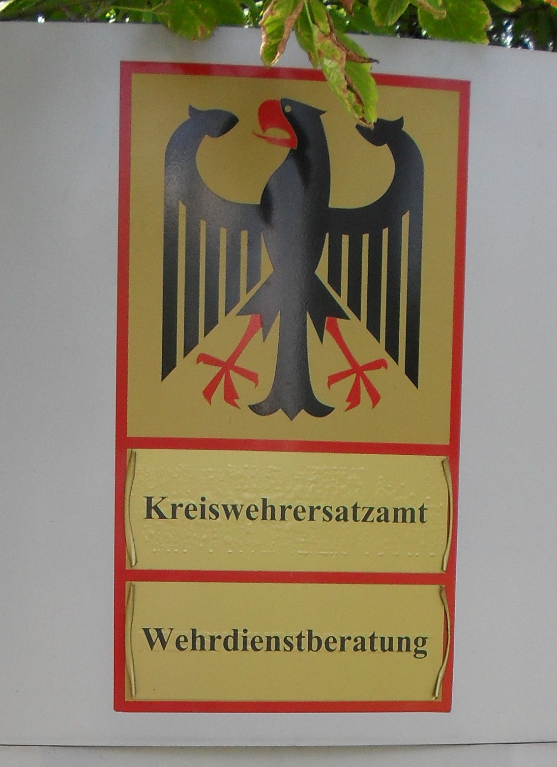 Klingelschild Kreiswehrersatzamt Leipzig